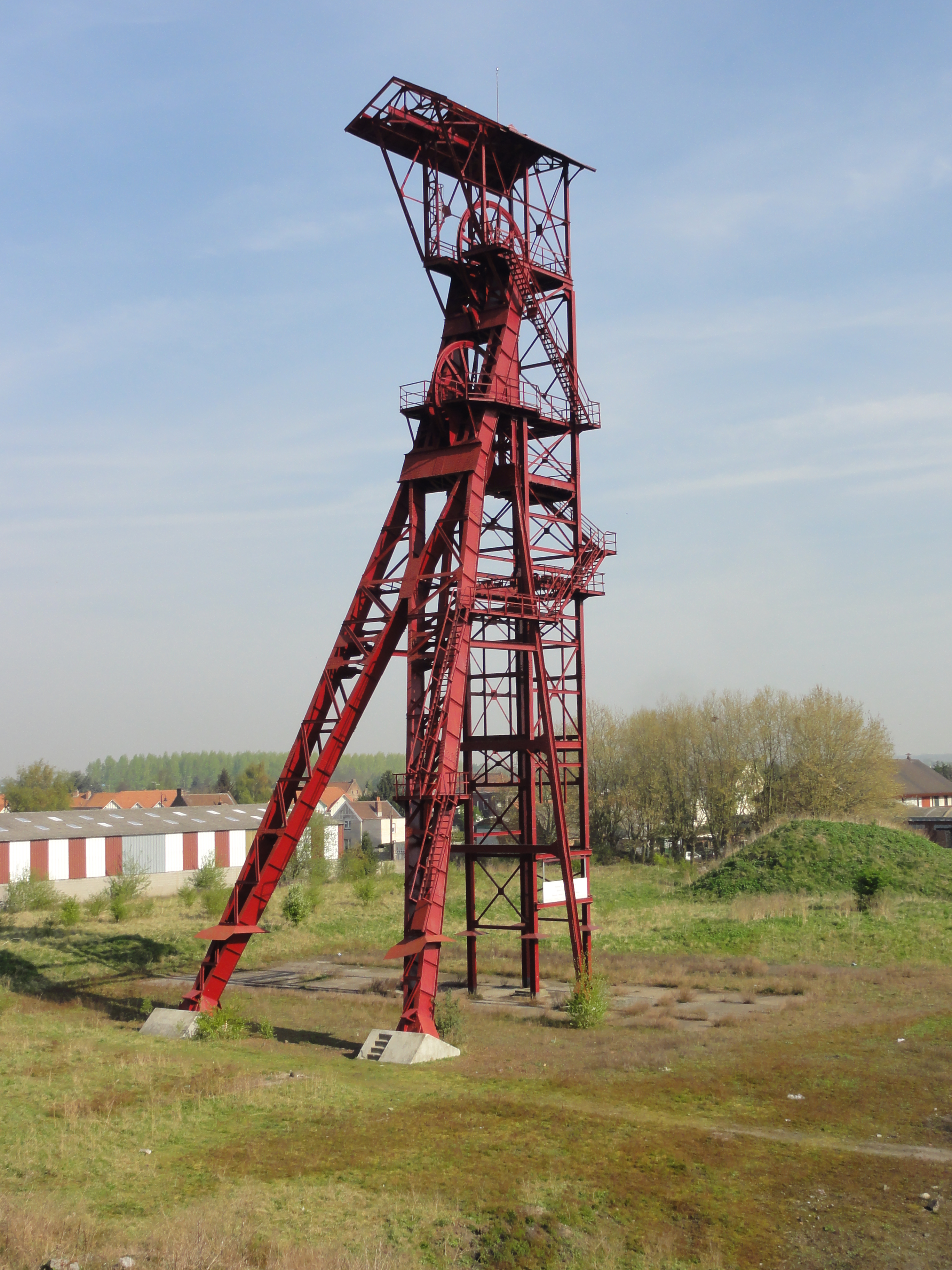 La fosse n° 8 - 8 bis de la Compagnie des mines de Dourges était un charbonnage du bassin minier du Nord-Pas-de-Calais constitué de deux puits situé à Évin-Malmaison, Pas-de-Calais, Nord-Pas-de-Calais, France. .